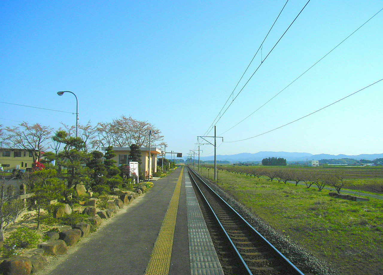 Oka Station. Kakuda, Miyaagi prefecture, Japan.